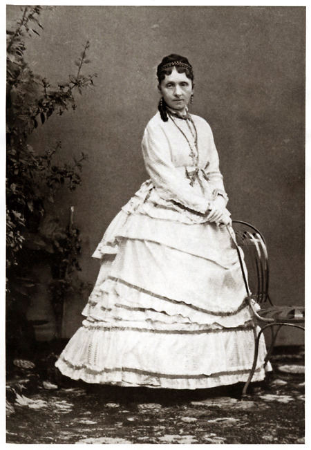 Hoffräulein Gräfin Julia Hauke (1825-1895), spätere Prinzessin Julie von Battenberg.